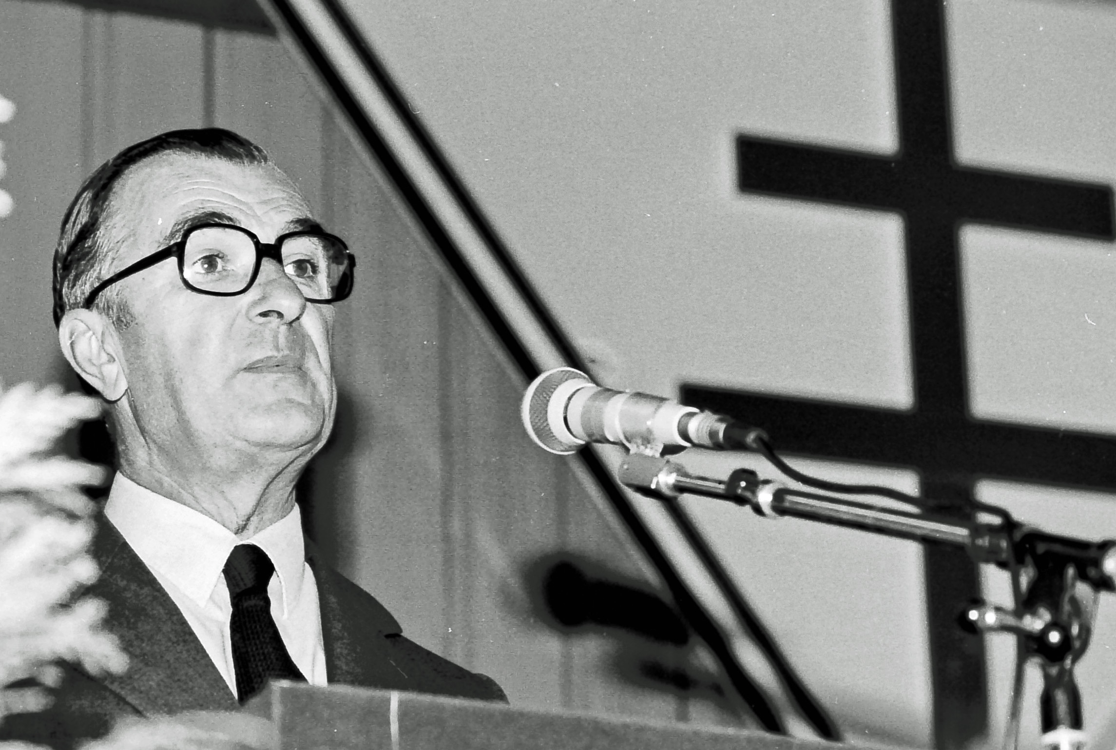 Yvon Bourges, ministre de la Défense français (1975-1980), Morlaix, 14 octobre 1984.